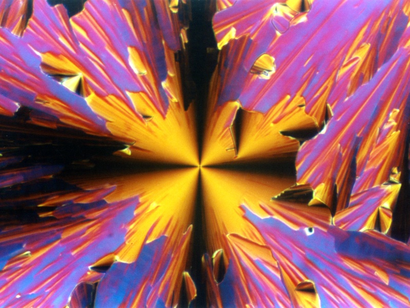 Polarisationsmikroskopische Aufnahme einer rechtwinkligen kolumnaren Phase von bent-core („bananenförmigen“) Mesogenen; sogenannte B1-Phase; zirkulare Domäne (Spherulit) eingebettet in eine Mosaiktextur.